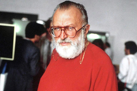 Sergio Leone, Italian film director.